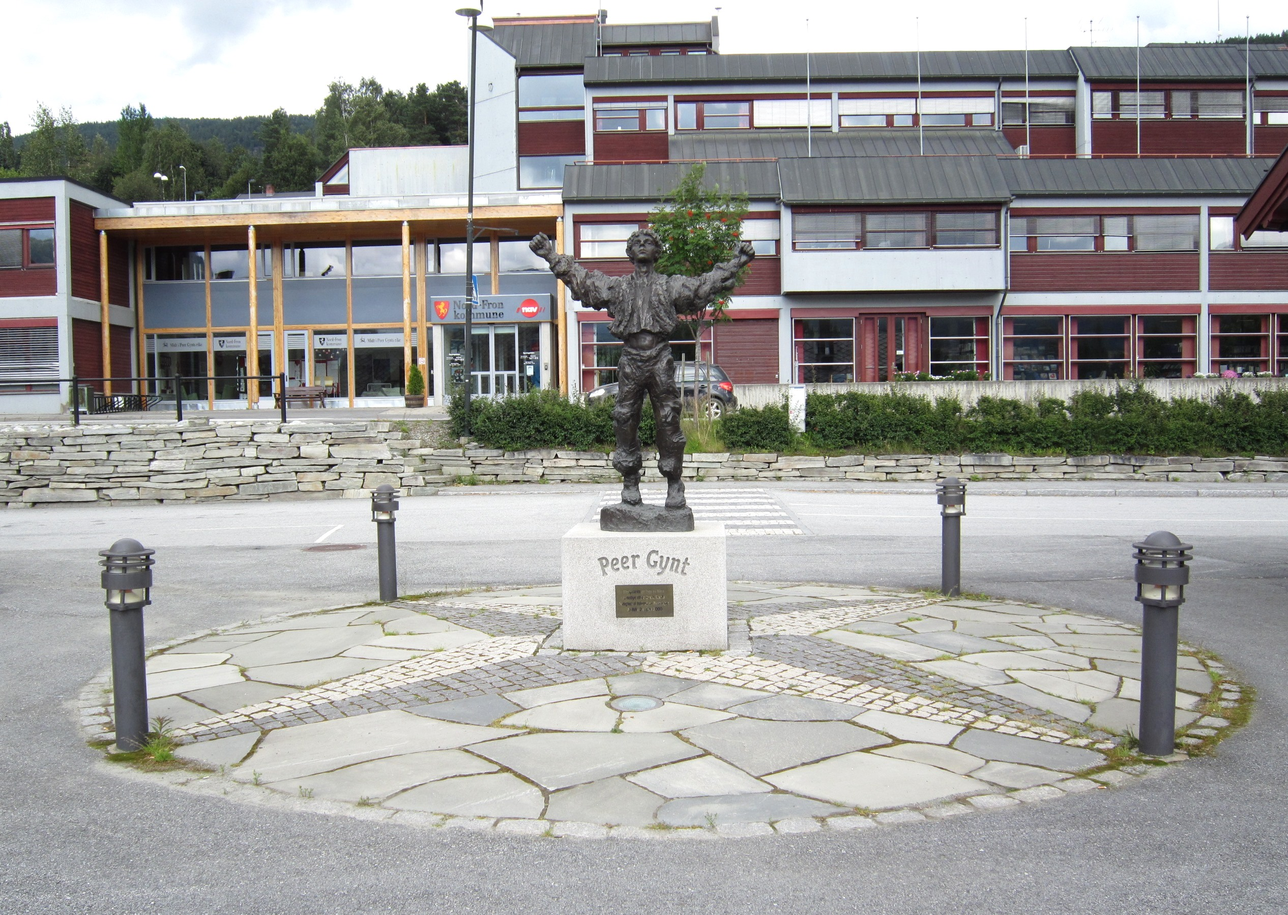 Peer Gynt-statuen ved FV409 på Vinstra